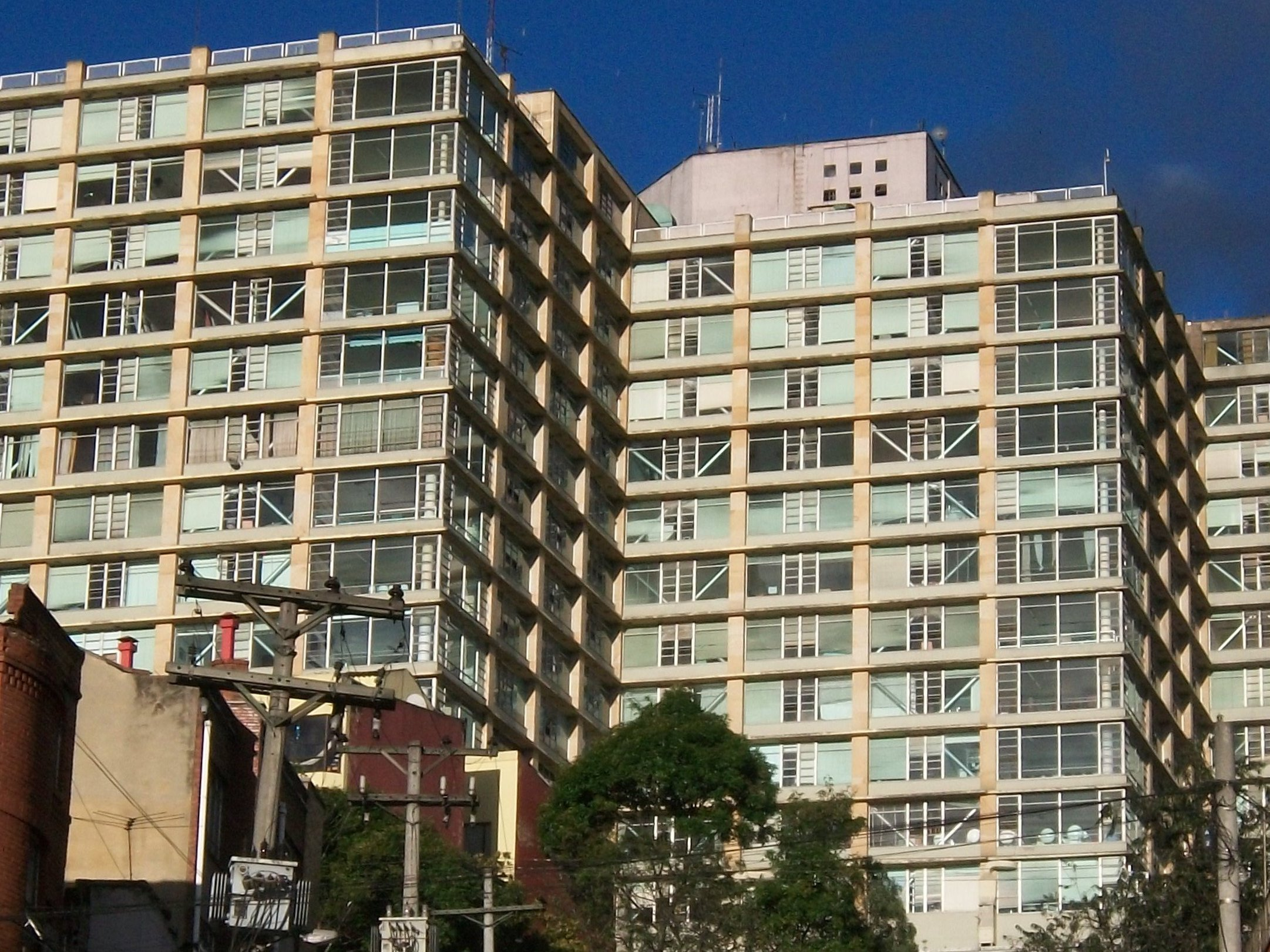 Hospital Militar en Bogotá, Chapinero.